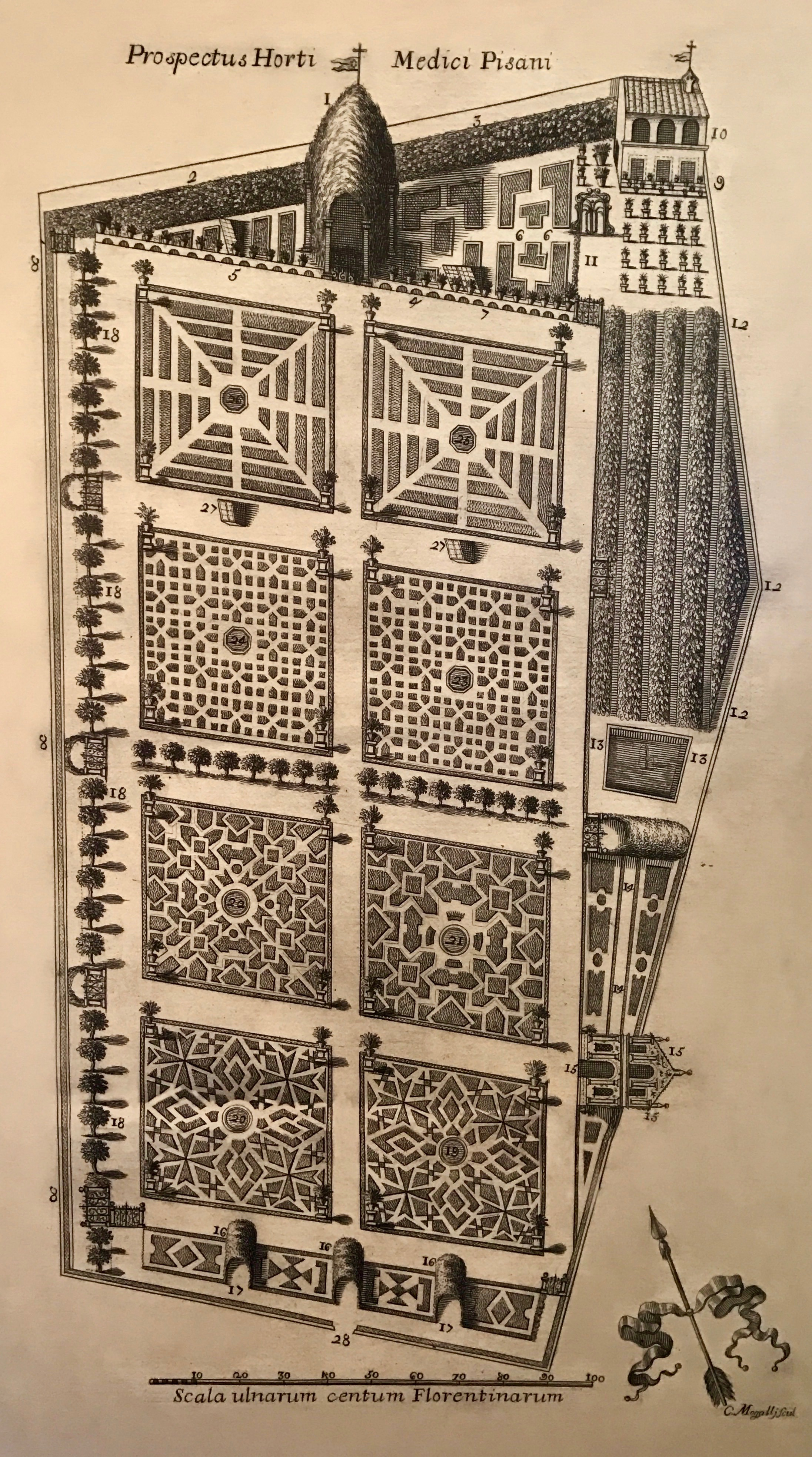 Pianta del giardino dei semplici Opera di Cosimo Magalli contenuta nel libro di M. Tilli Catalogus Plantarum Horti Pisani del 1723